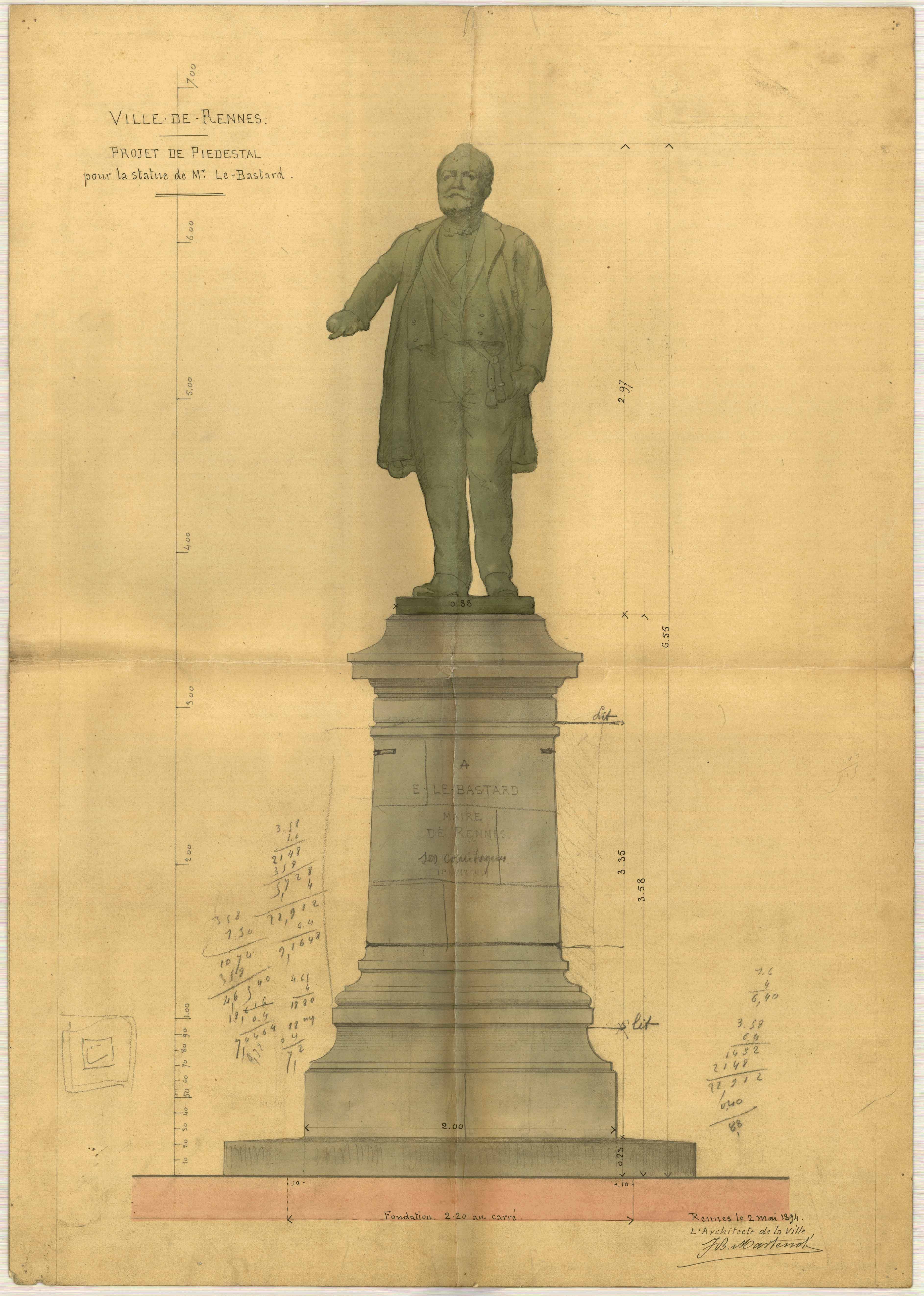 Projet de piédestal pour la statue d'Edgar Le Bastard, réalisée par Emmanuel Dolivet. Archives municipales de Rennes, 2 Fi 4284.